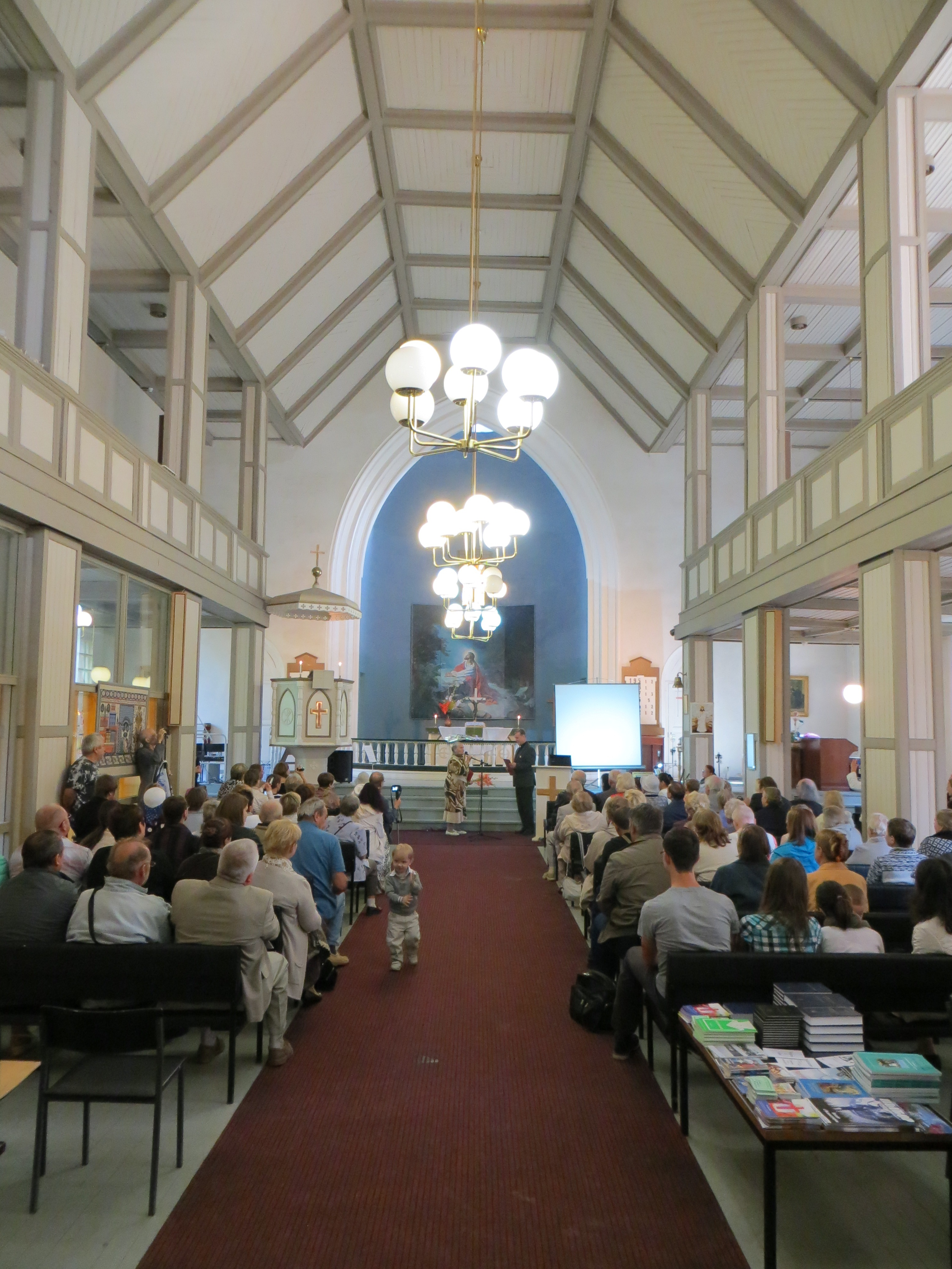 Кирха Святого Иоанна Крестителя в Губаницах.